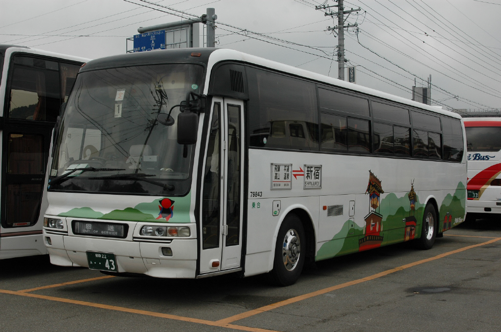 高山営業所にて、許可を得て撮影